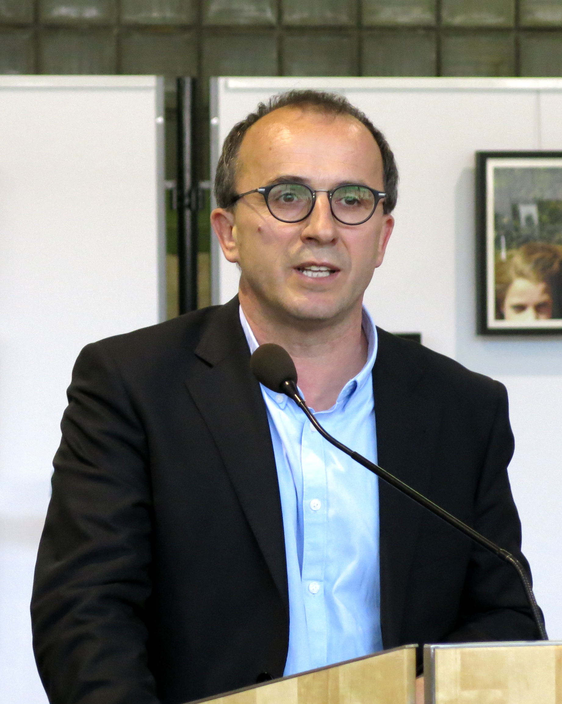 De Buergermeeschter Roberto Traversini hält eng Ried beim Vernissage vu "Jukowo Jugendkonschtwoch 2014", am 1535°C zu Déifferdeng.